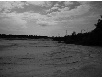 Изглед јаловишта